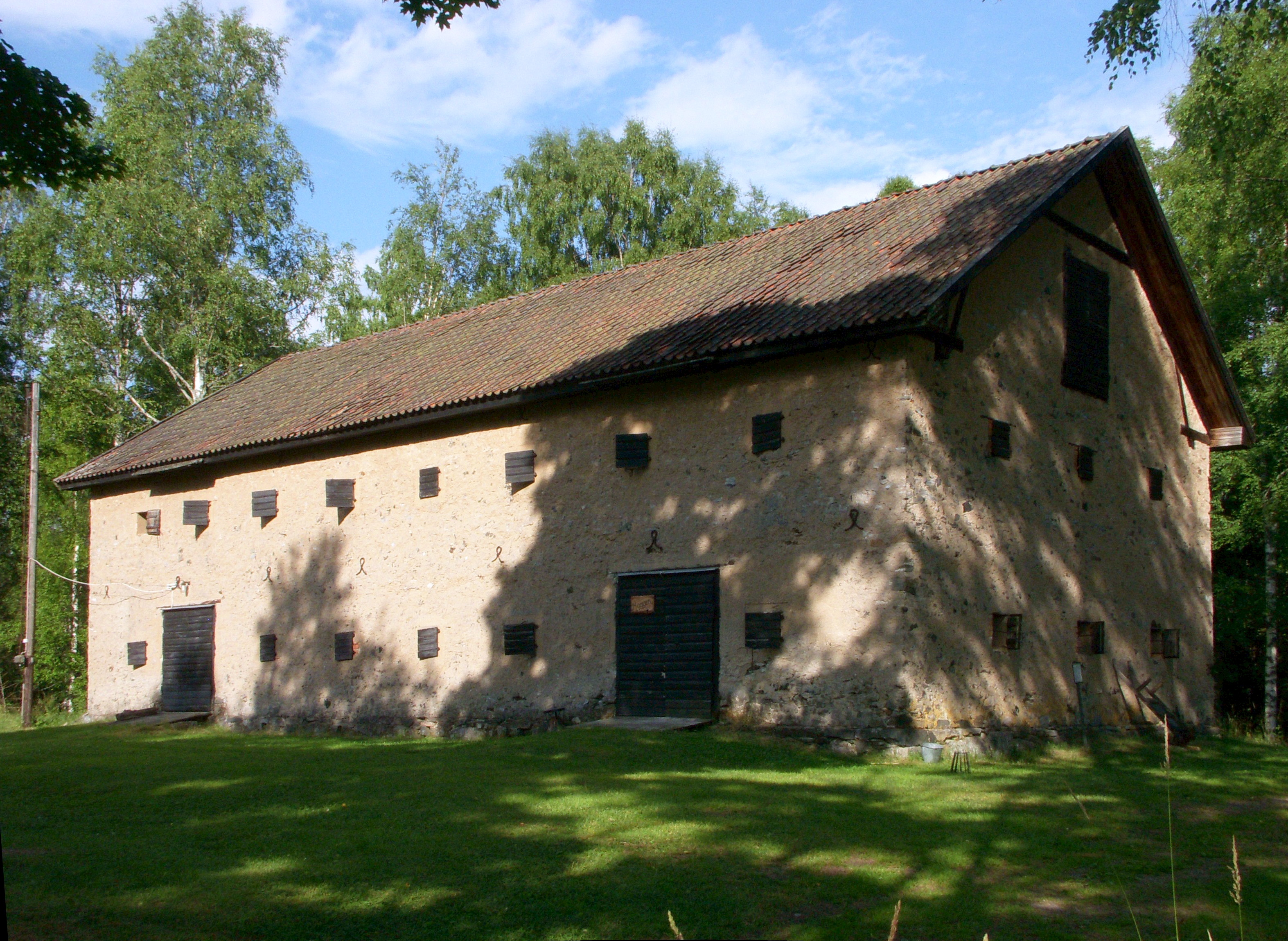 Björnhyttan, sädesmagasin